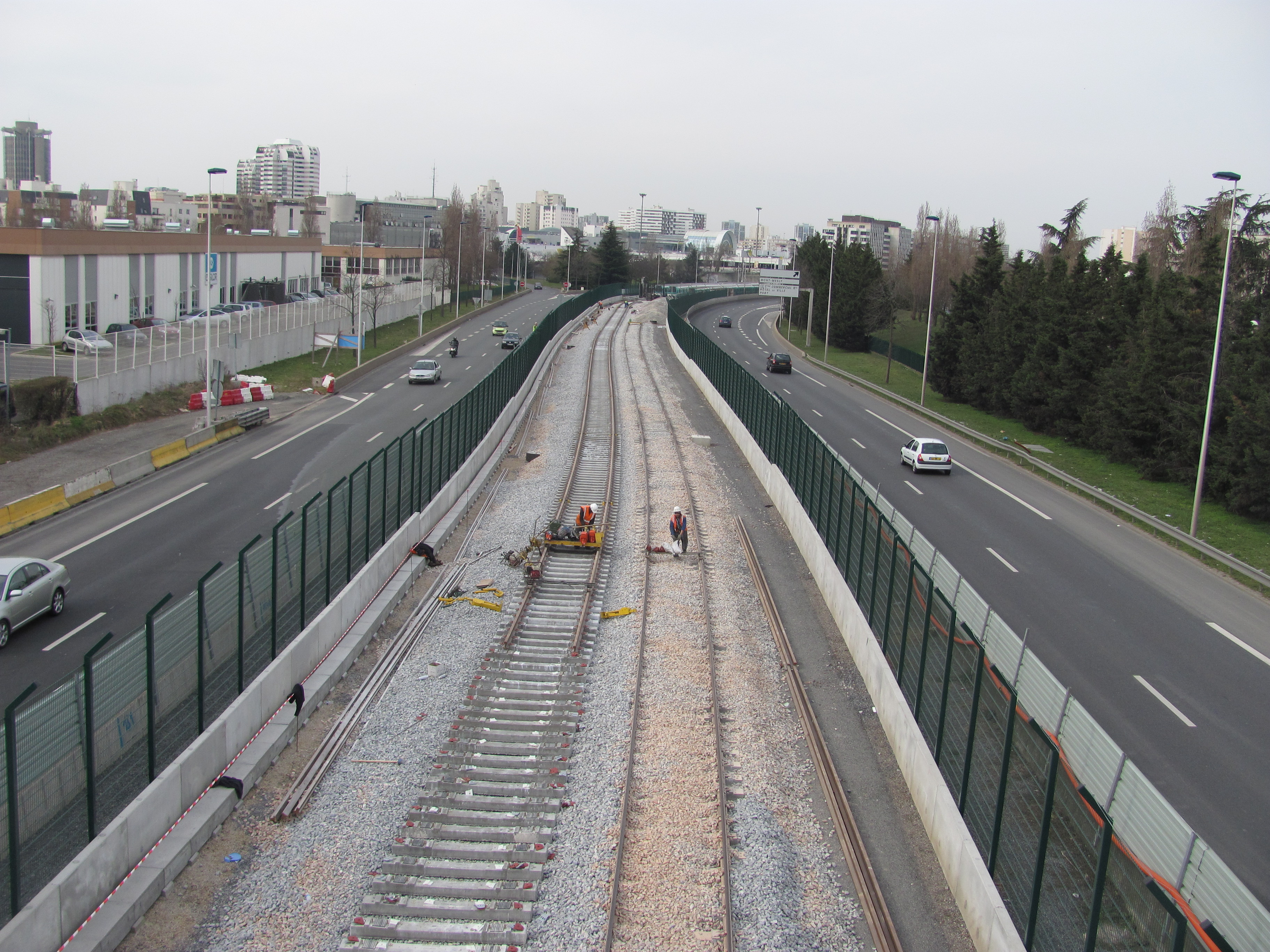 Au fond, l'arrière gare de la station Créteil-Préfecture, les voies sont en cours de pose avant de rejoindre le saut de mouton.